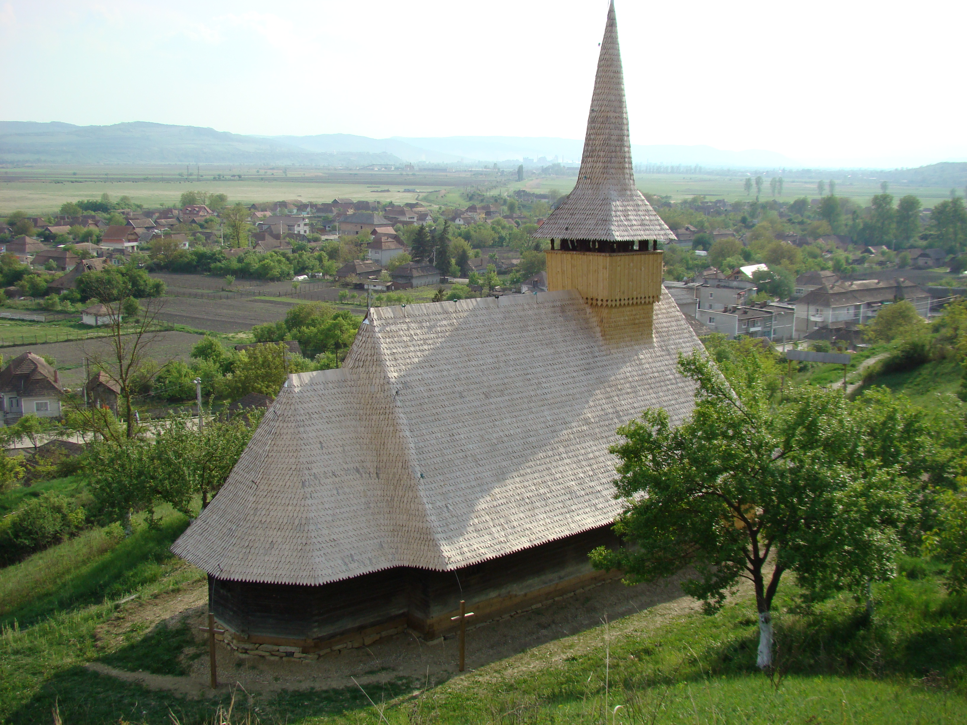 Biserica de lemn din Lunca Mureşului, judeţul Alba.